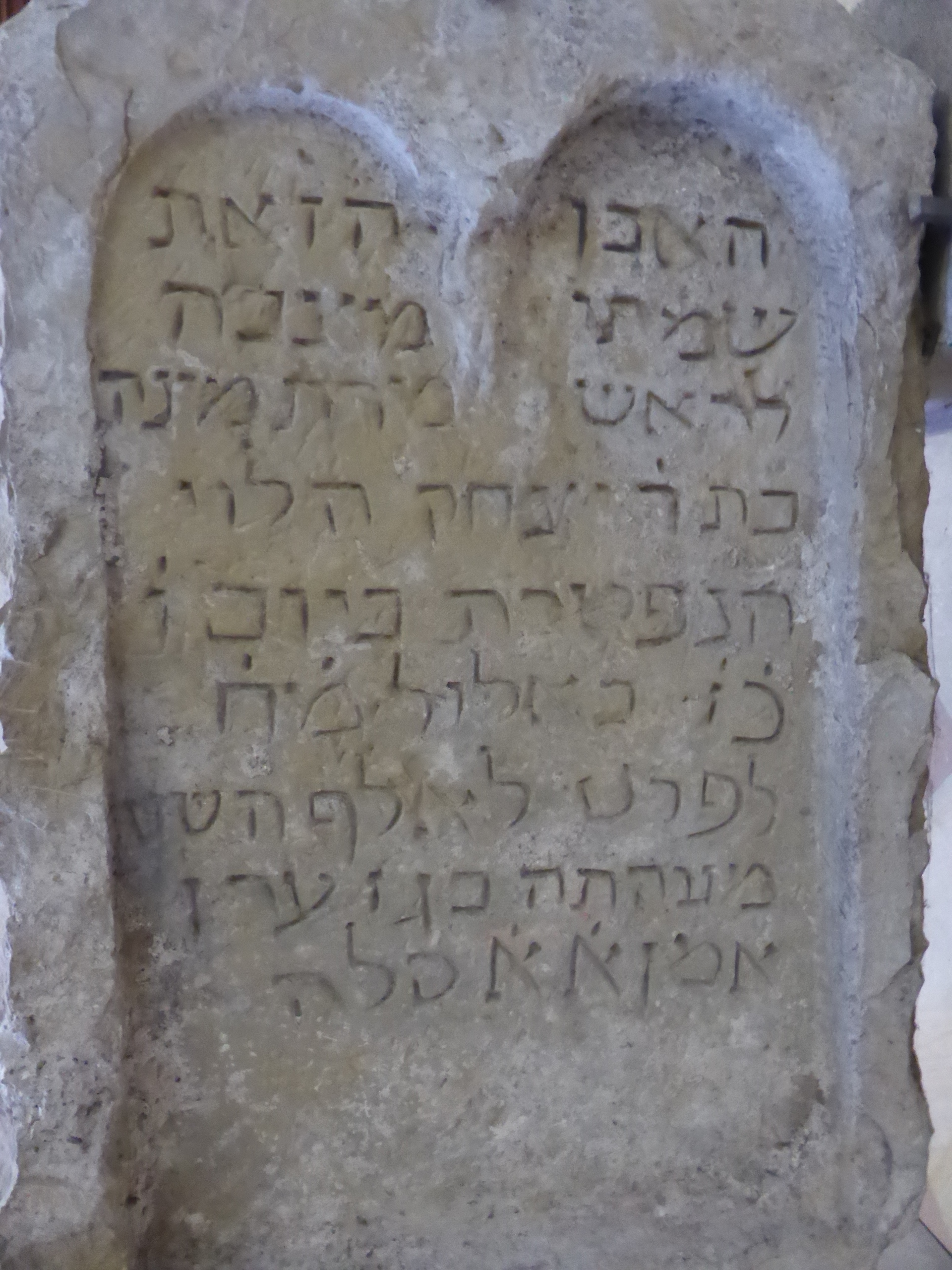 Jüdischer Grabstein im Ulmer Münster